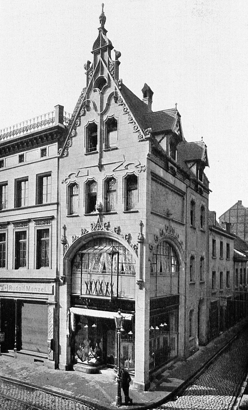 Schneidersches Geschäftshaus in Düsseldorf, Mittelstraße 11 / Wallstraße 29a; erbaut 1896 nach Entwurf des Düsseldorfer Architekten Hermann vom Endt